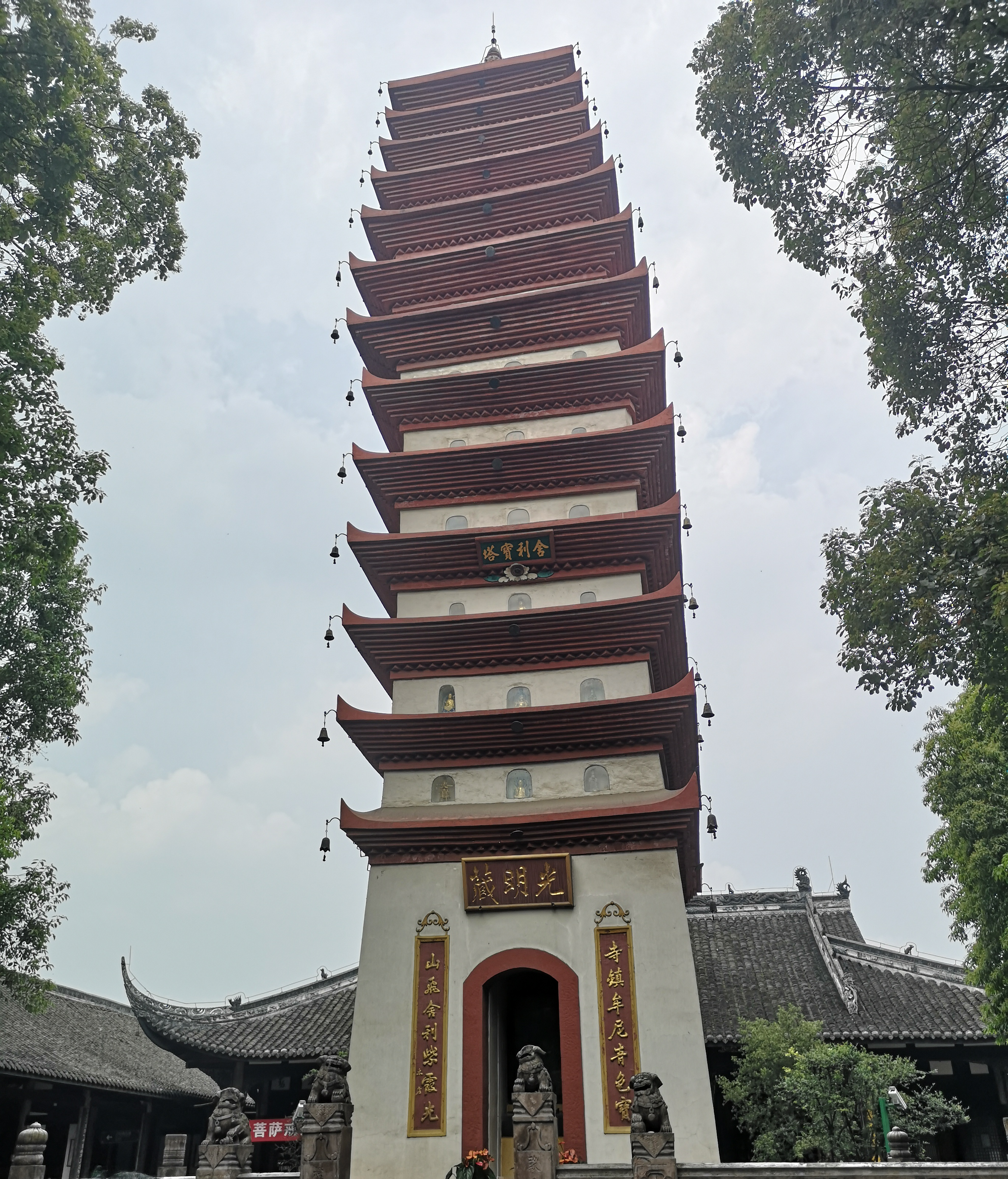 成都寶光寺-舍利塔（修葺後）